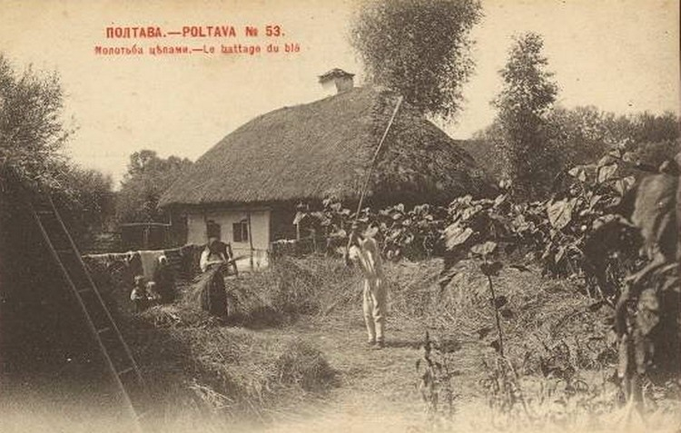 Молотьба цепами. Полтавщина. Дореволюционная открытка.